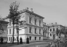 Hedvig Sofiahemmet, Eläintarhantie 11, Kallio, Helsinki, valokuvaaja Alfred Edvard Rosenbröijer